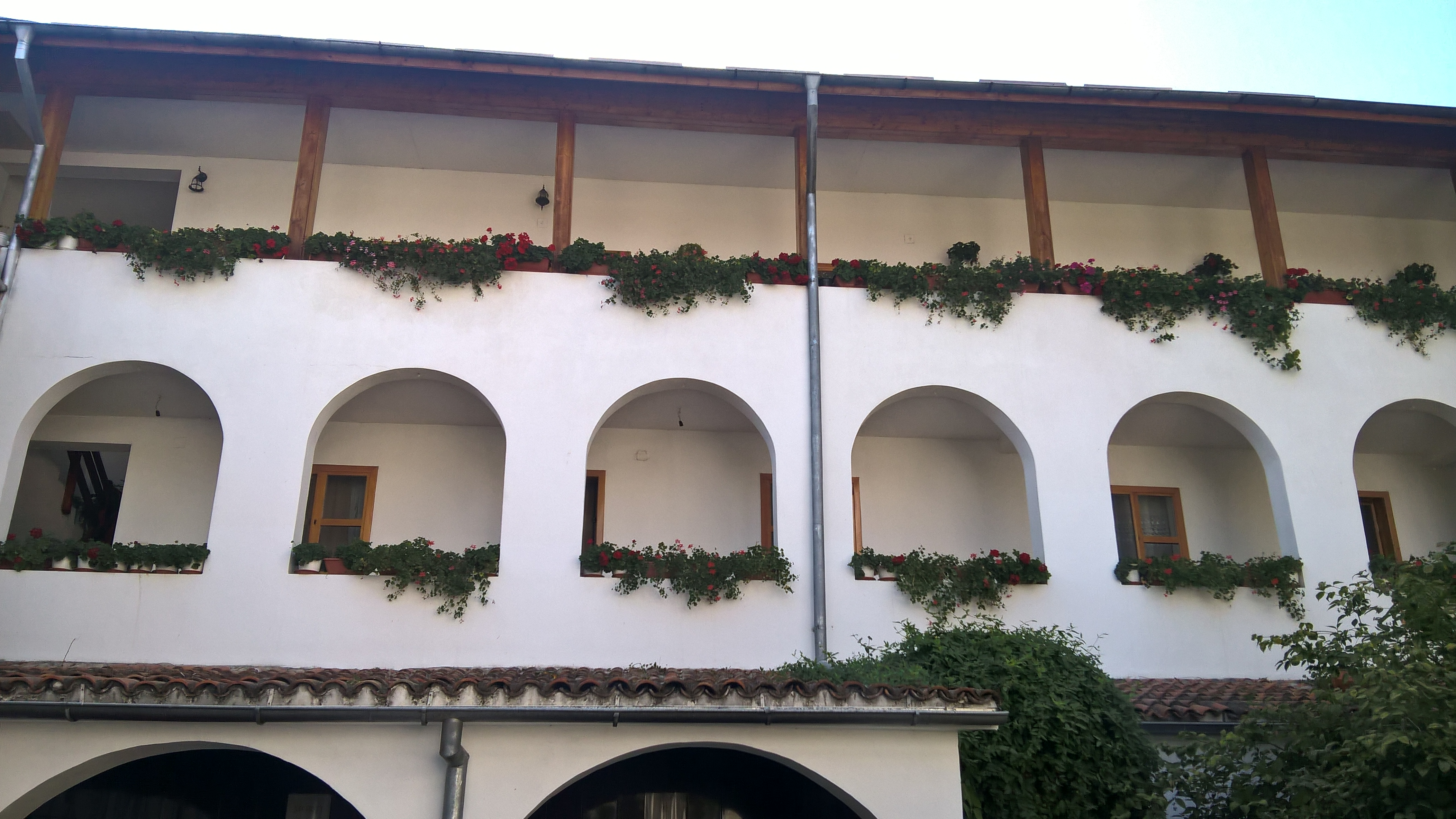 Chilii 05